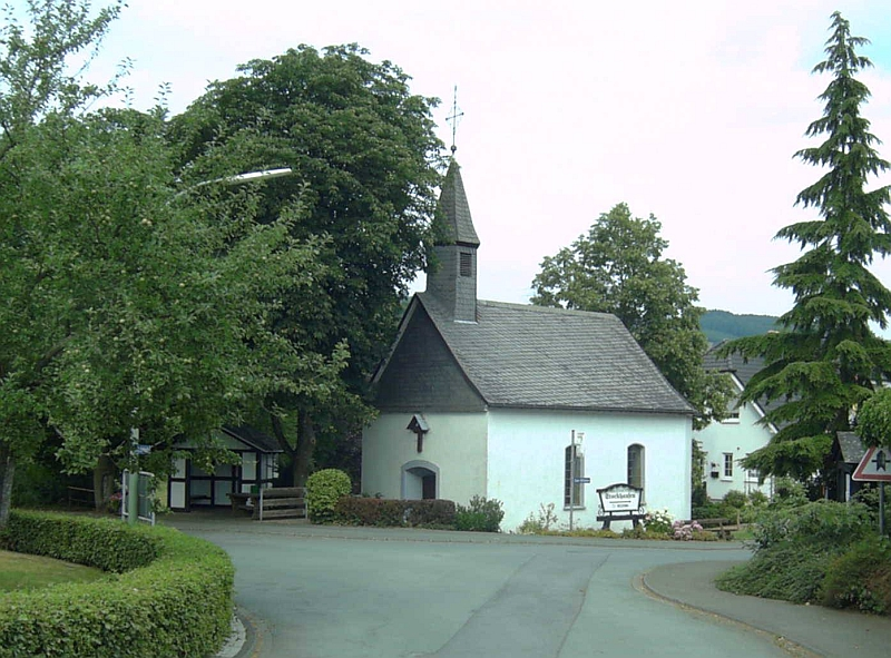 Kapelle in Sellinghausen (Schmallenberg), Germany.